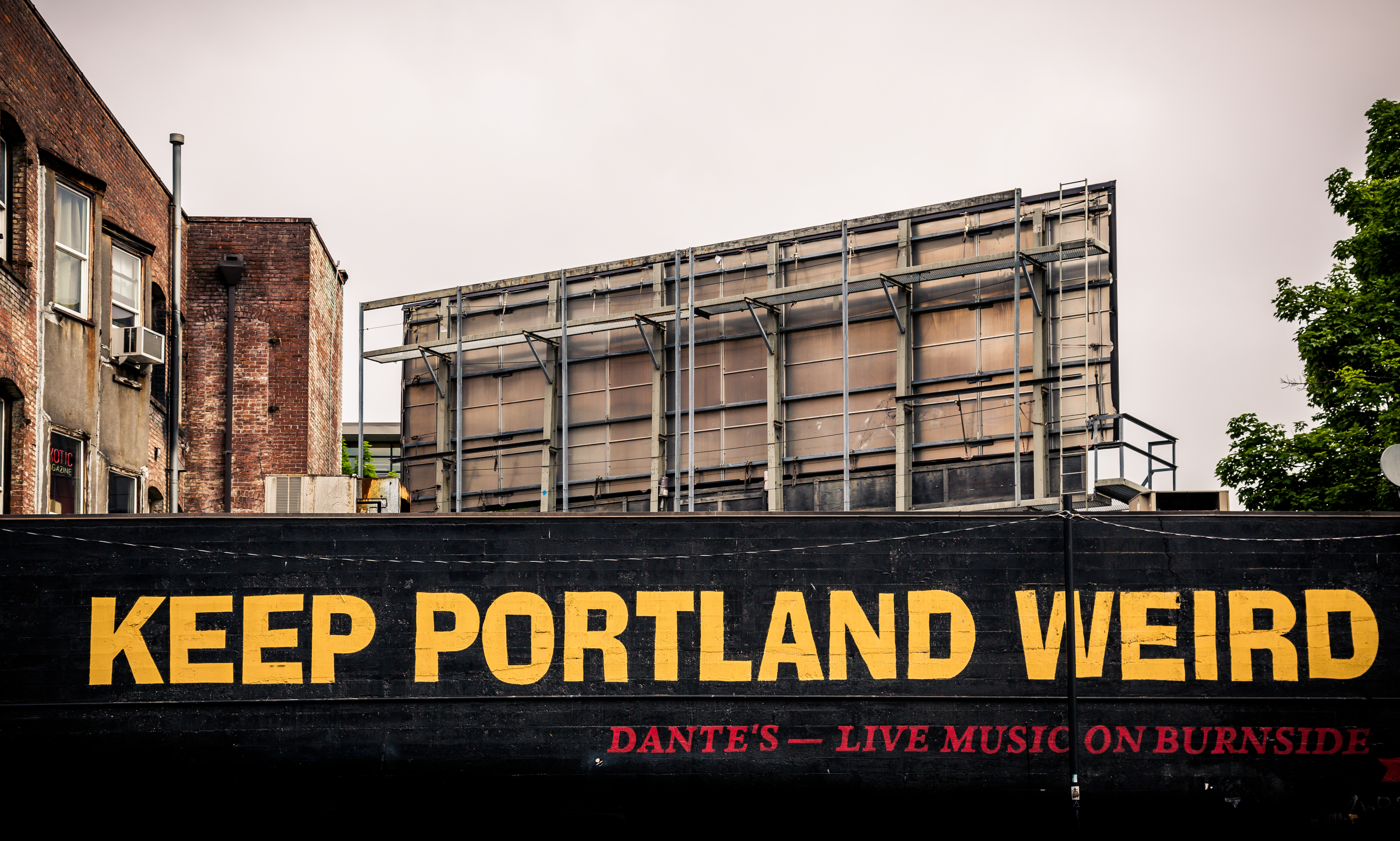 Keep Portland Weird